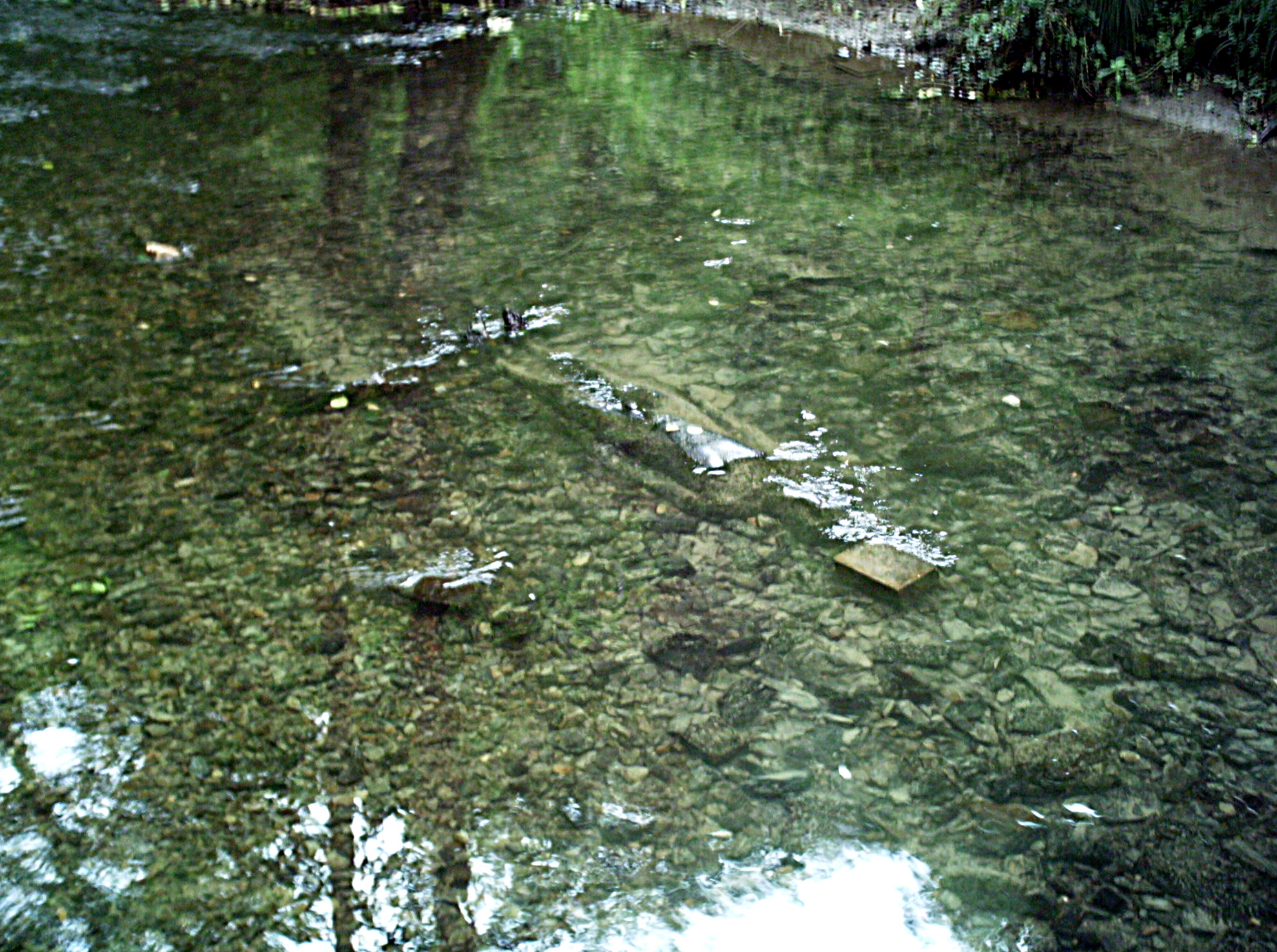 Kunstweg MenschenSpuren: Gusseisenskulptur „Being“ als Abbild des Künstlers Antony Gormley in der Düssel; Bereich im Naturschutzgebiet „Neandertal“ in Erkrath